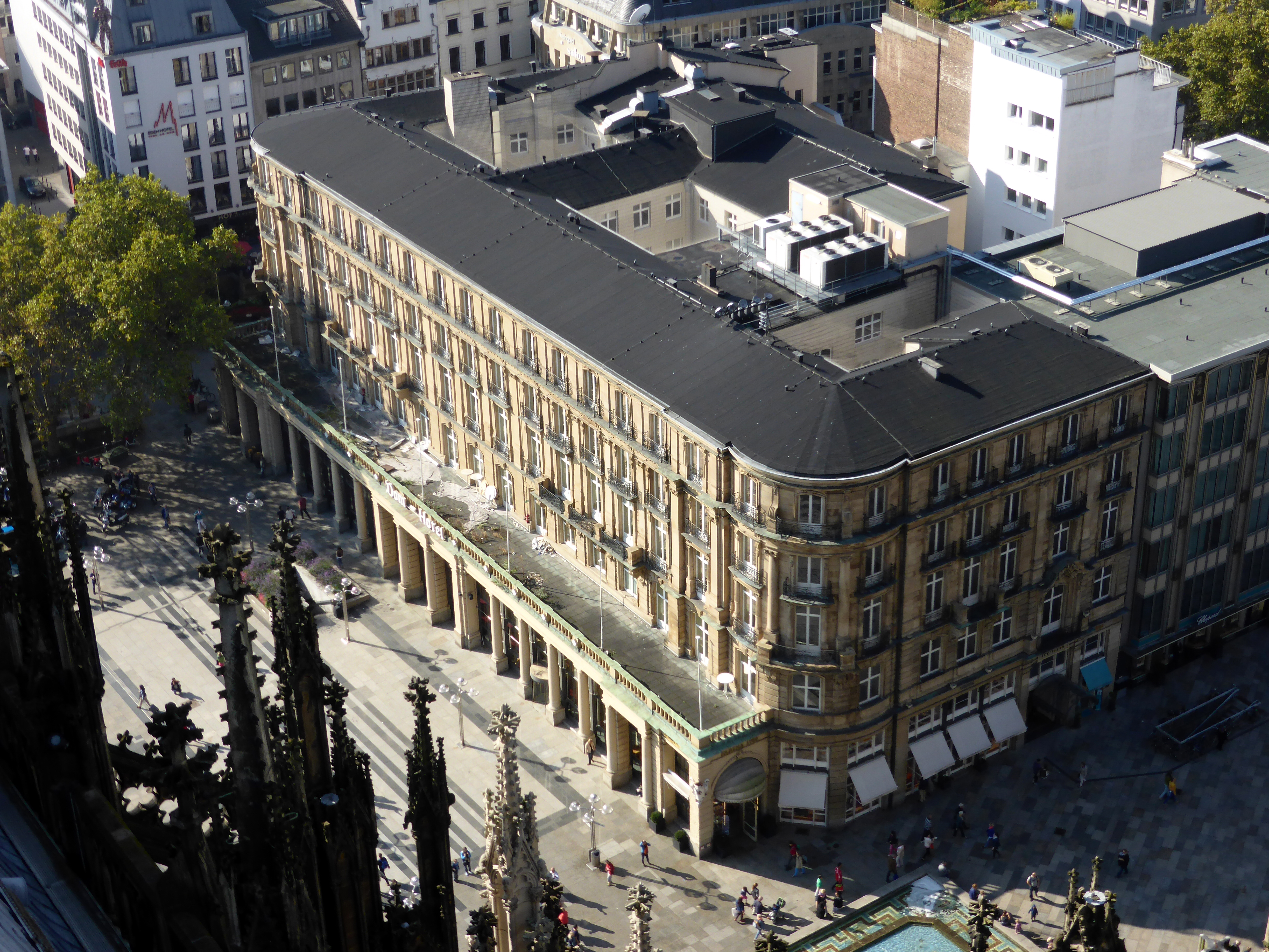 Dom-Hotel-Köln von oben, 2014. This is a photograph of an architectural monument.